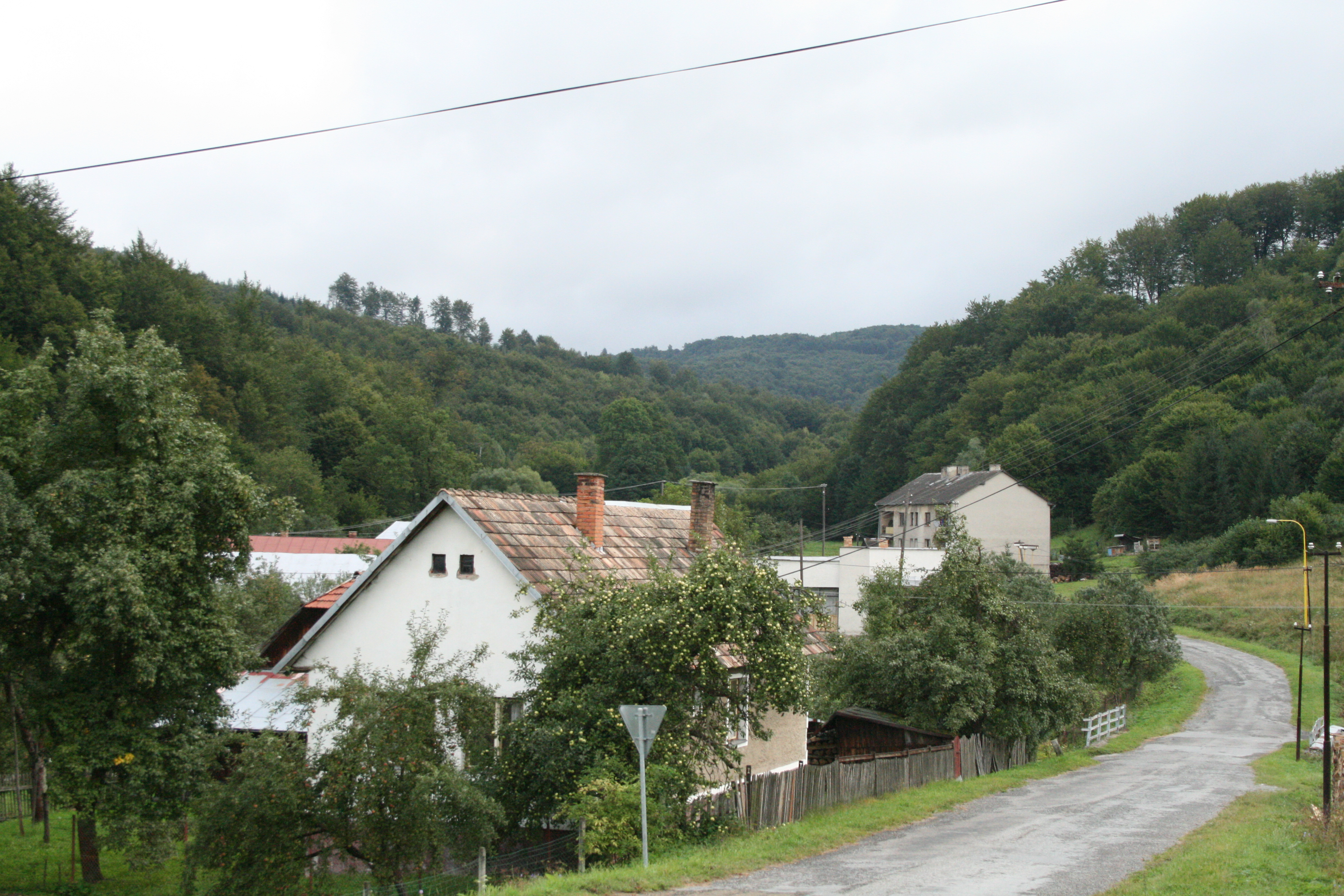 Bodružal. V pozadí údolím Prikrianky sa rozprestiera chránená krajina oblasť Východné Karpáty.